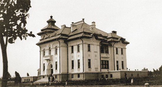 Reşedinţa episcopului Hotinului din Bălţi în perioda interbelică.